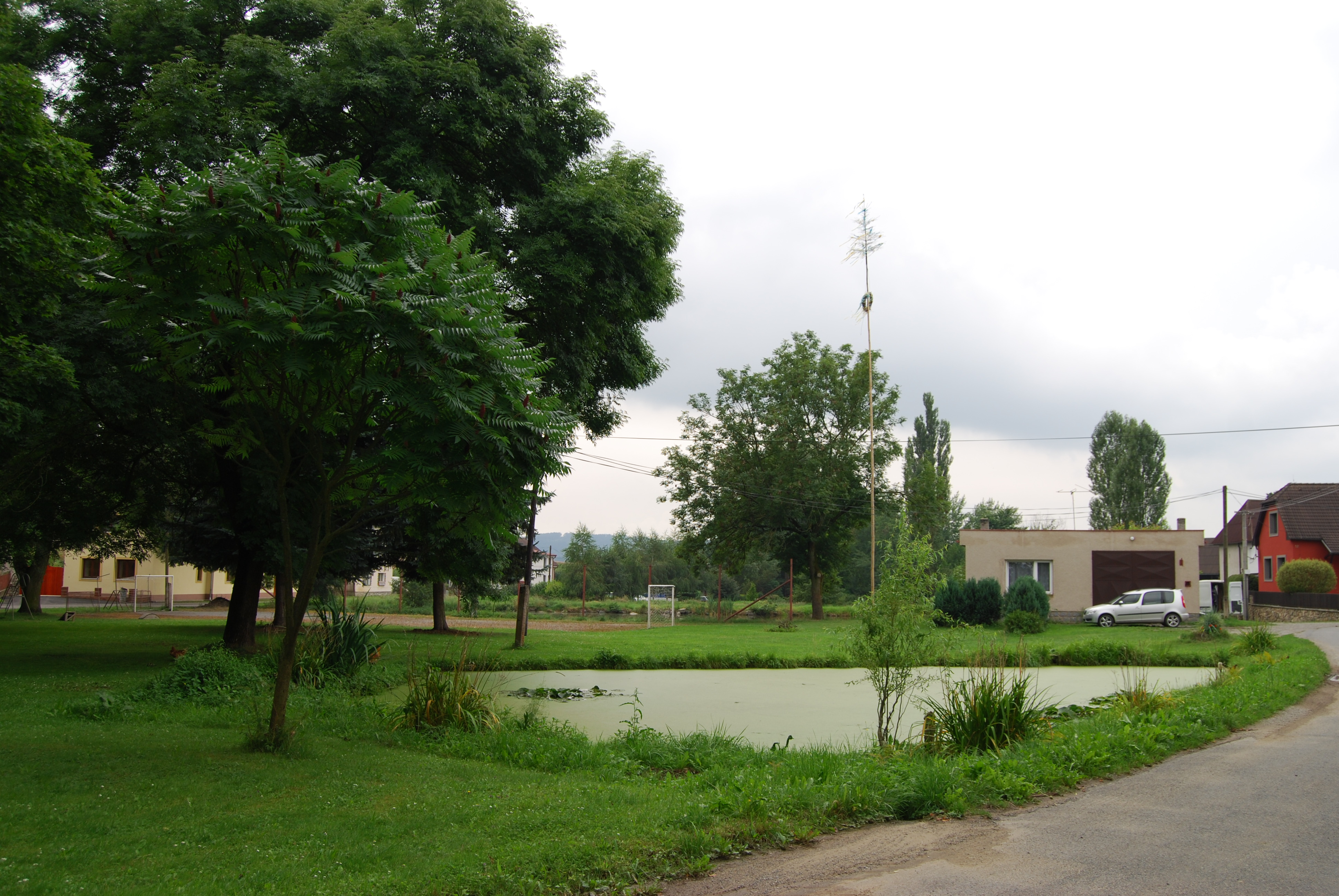 Pohled na část návsi a rybník. Divišovice je část města Sedlec-Prčice v okrese Příbram. Česká republika. - Google Maps - Google Earth